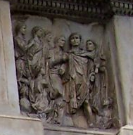 Détail de l'Arc de Trajan à Bénévent : Trajan réfléchit et écoute les conseils de Lusius Quietus tandis que la Mésopotamie implore la grâce de l'empereur.